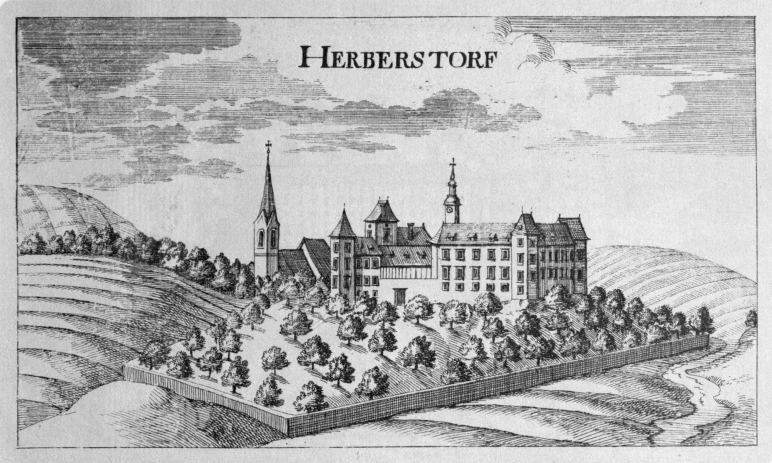 G. M. Vischers Käyserlichen Geographi, Topographia Ducatus Stiriae, Das ist: Eigentliche Delineation / und Abbildung aller Städte / Schlösser / Marcktfleck / Lustgärten / Probsteyen / Stiffter / Clöster und Kirchen / so es sich im Herzogthumb Steyrmarck befinden; Und anjetzo Umb einen billichen Preyß zu finden seynd Bey Johann Bitsch Universitäts Buchhandlern / Auff dem Juden=Platz bey der guldenen Saulen. Graz 1681 Die Nummerierung der Dateien folgt der alphabetischen Reihung der Ortsnamen